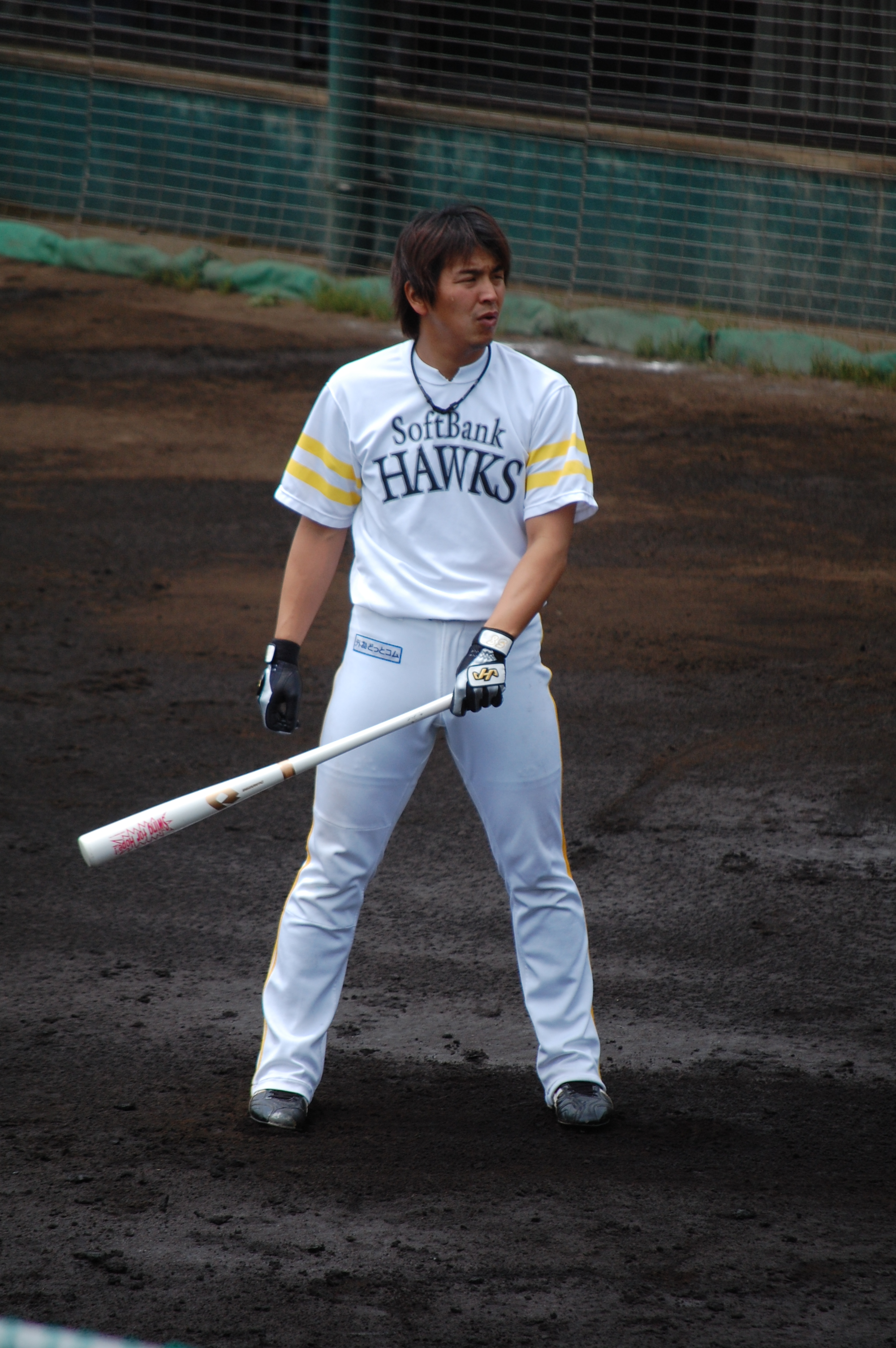 辻武史。2009年5月15日、雁ノ巣球場にて撮影。